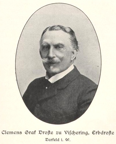 Clemens Heidenreich Droste zu Vischering (1832-1923), Abgeordneter des Deutschen Reichstags und des Preussischen Herrenhauses, Vorsitzender des Zentralkomitees der Deutschen Katholiken